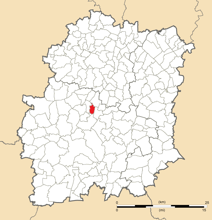 Carte de position de Mauchamps en Essonne (91)